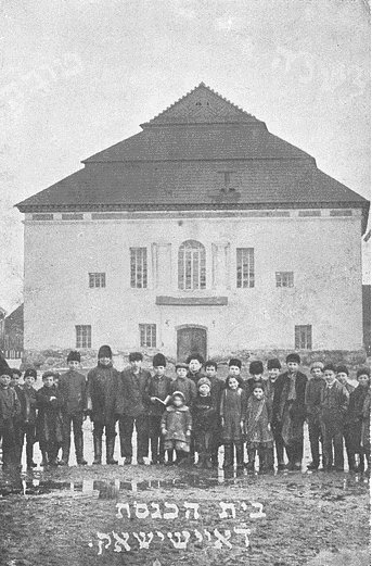 Big Synagogue, Eišiškės